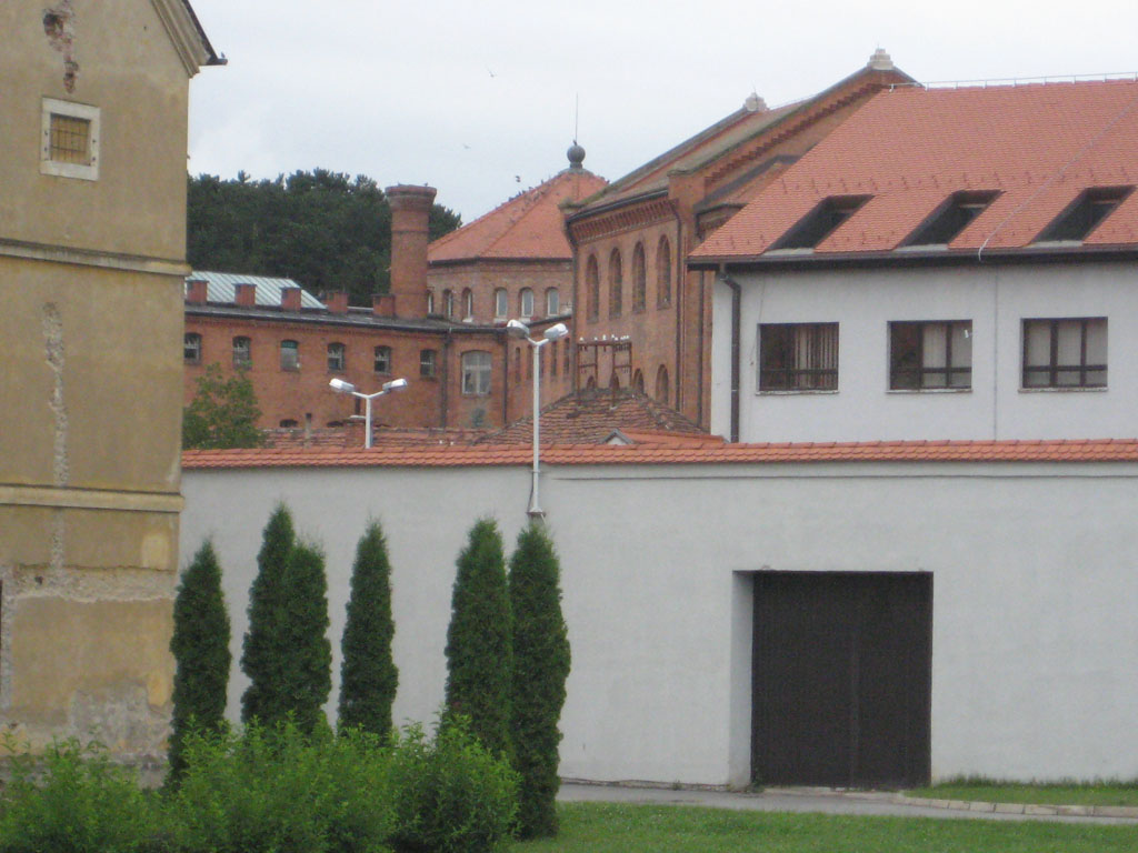 Kaznionica u Lepoglavi